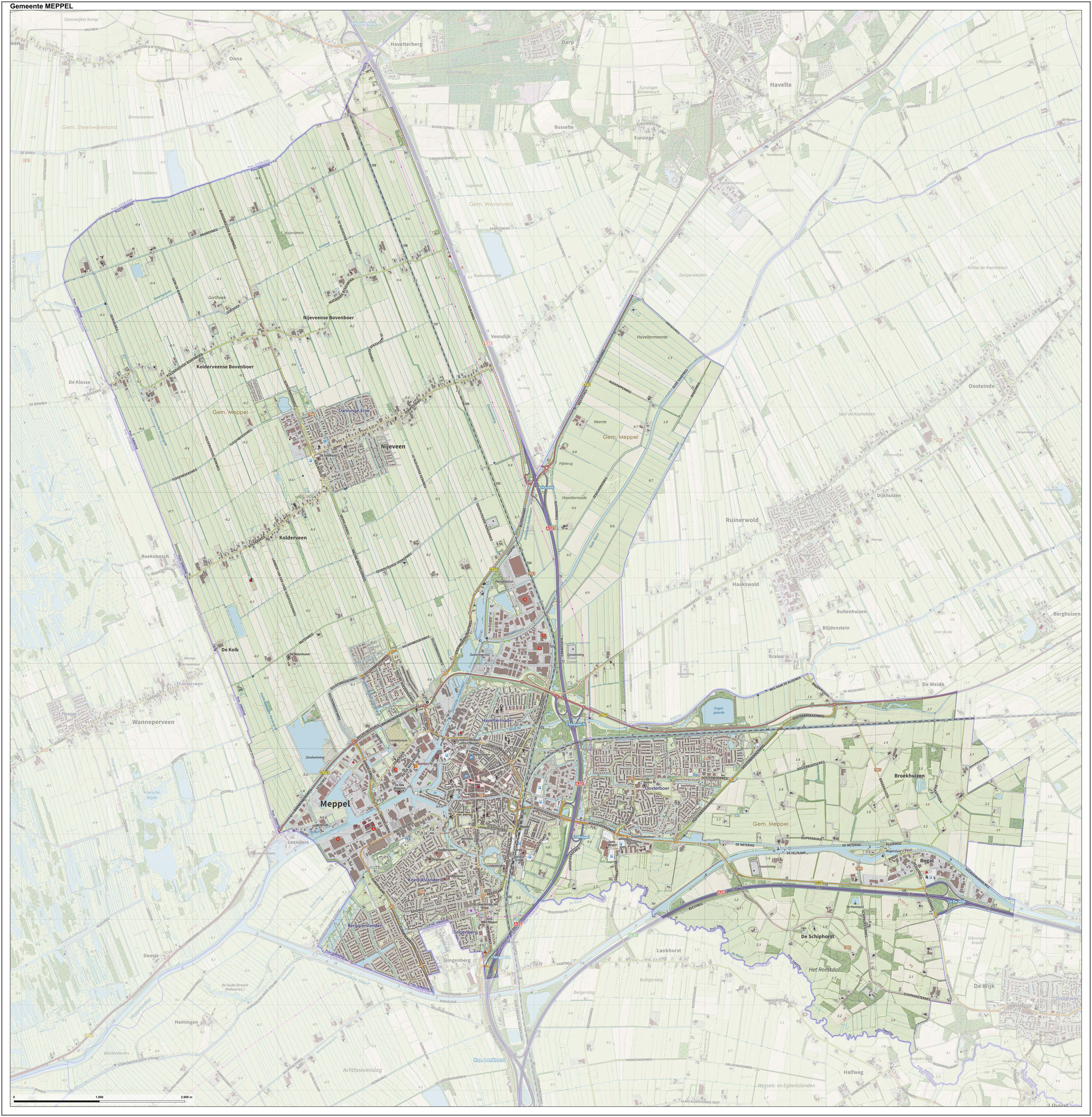 Topografische gemeentekaart. Resolutie: 400 pixels/km. Kaartbeeld samengesteld uit de open geodata van de Top10NL en Top25namen (Kadaster), Creative Commons-BY licentie. Gebouwvlakken uit open geodata BAG extract. Wegen uit de OpenStreetMap, OpenStreetMap community. Reliëfschaduw uit de Actuele Hoogtekaart AHN2. Samenstelling en kleurenschema: Jan-Willem van Aalst, met QGIS. Zie ook de Legenda.